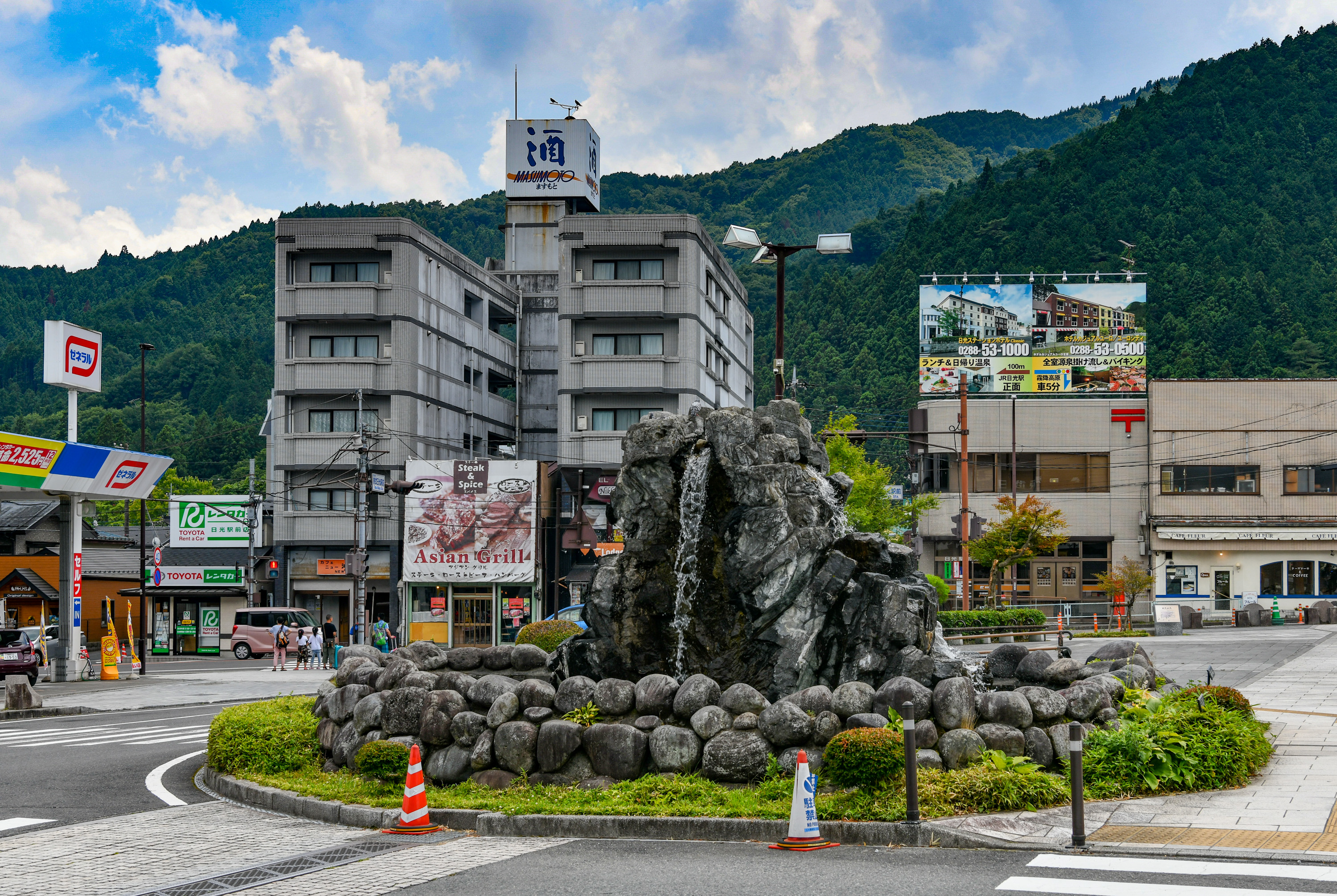 © Xiquinho Silva